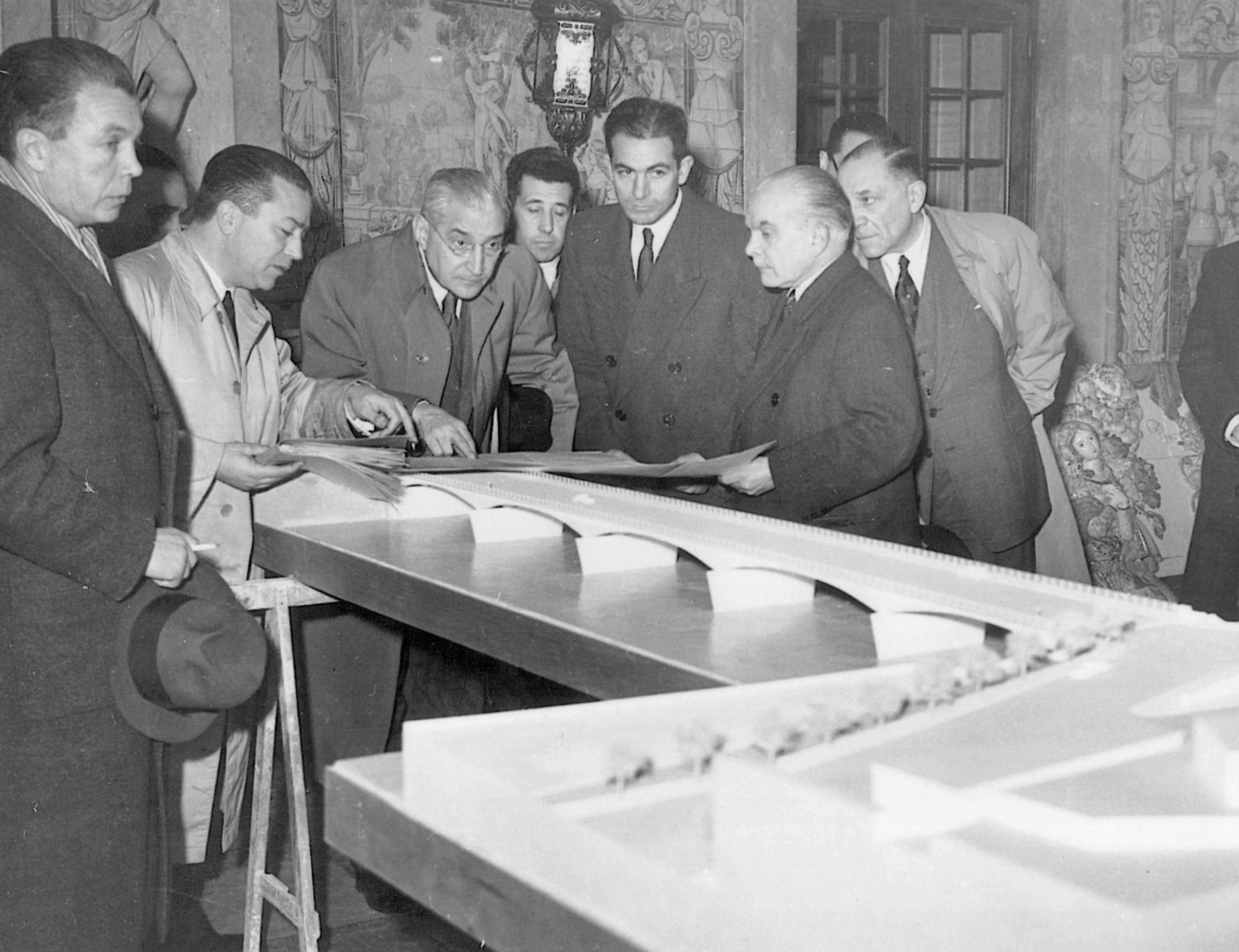 Ponte de Santa Clara em Coimbra, estão à esquerda o Minstro das OP de então, Eng. José Frederico Ulrich, o Avô, Salazar, atrás o Eng. Couvreur e mais em destaque o Prof. Eng. Edgar Cardoso autor do projecto de engenharia.